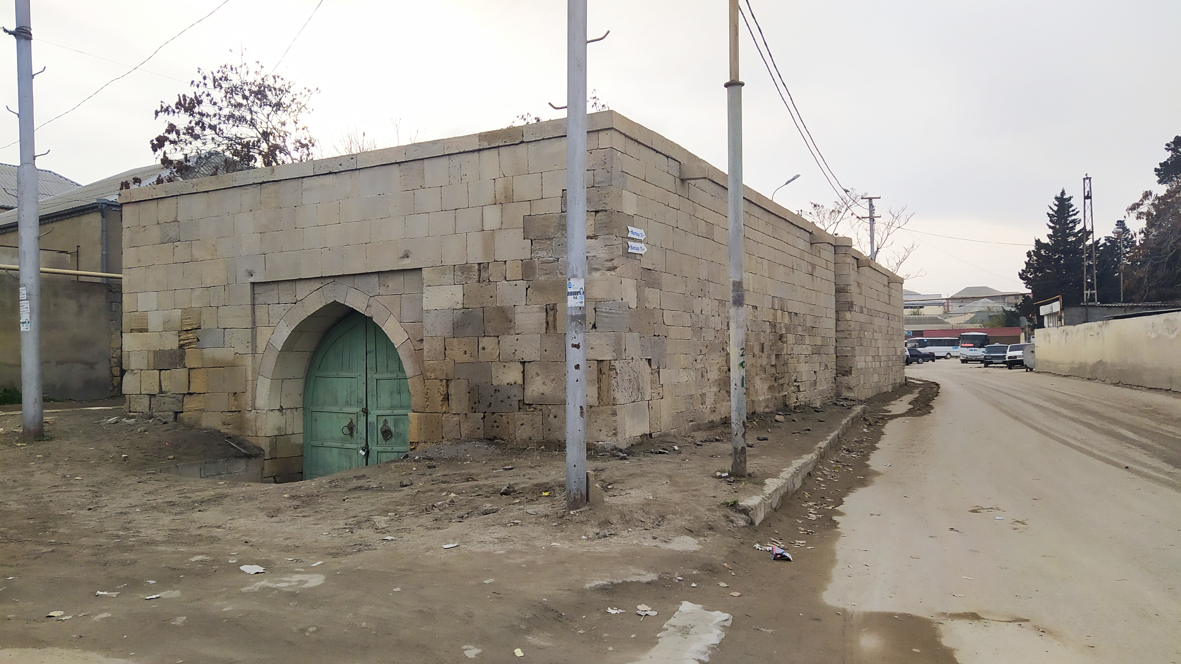 Balaxanı qəsəbəsində yerləşən XVII əsrə aid tarix-memarlıq abidəsi. Şah Səfi karvansarası 1635-1636-cı ildə usta Bürhan və sərkər Behbud tərəfindən inşa edilmişdir.